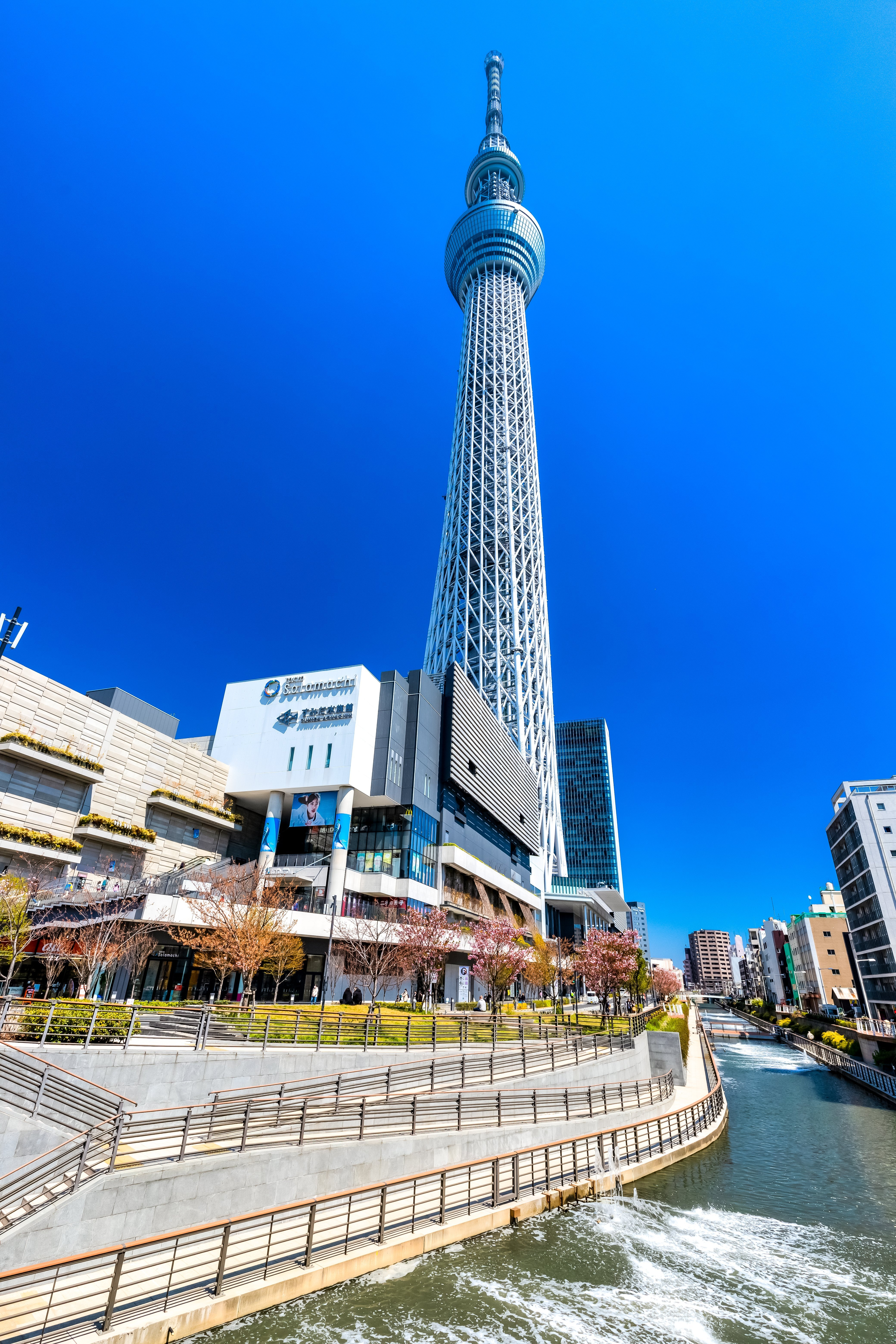 東京都墨田区、東京スカイツリー、言問通り、北十間川